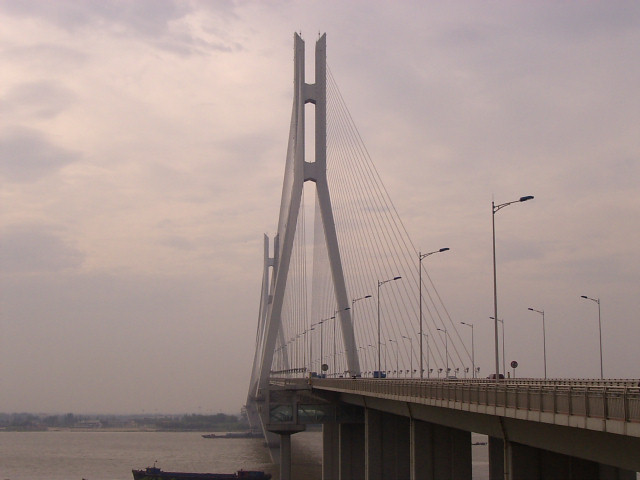 Second Nanjing Yangtze Bridge 南京長江二橋 橋の上 2004年6月4日撮影 撮影者:権作 参照